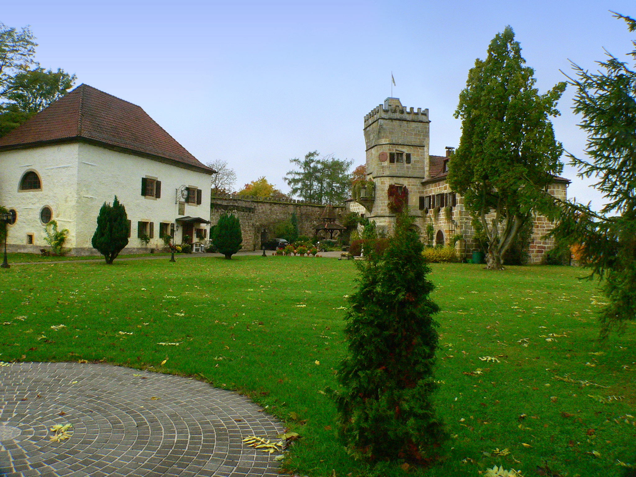 Schloss Geiersberg über Seßlach (Bayern)